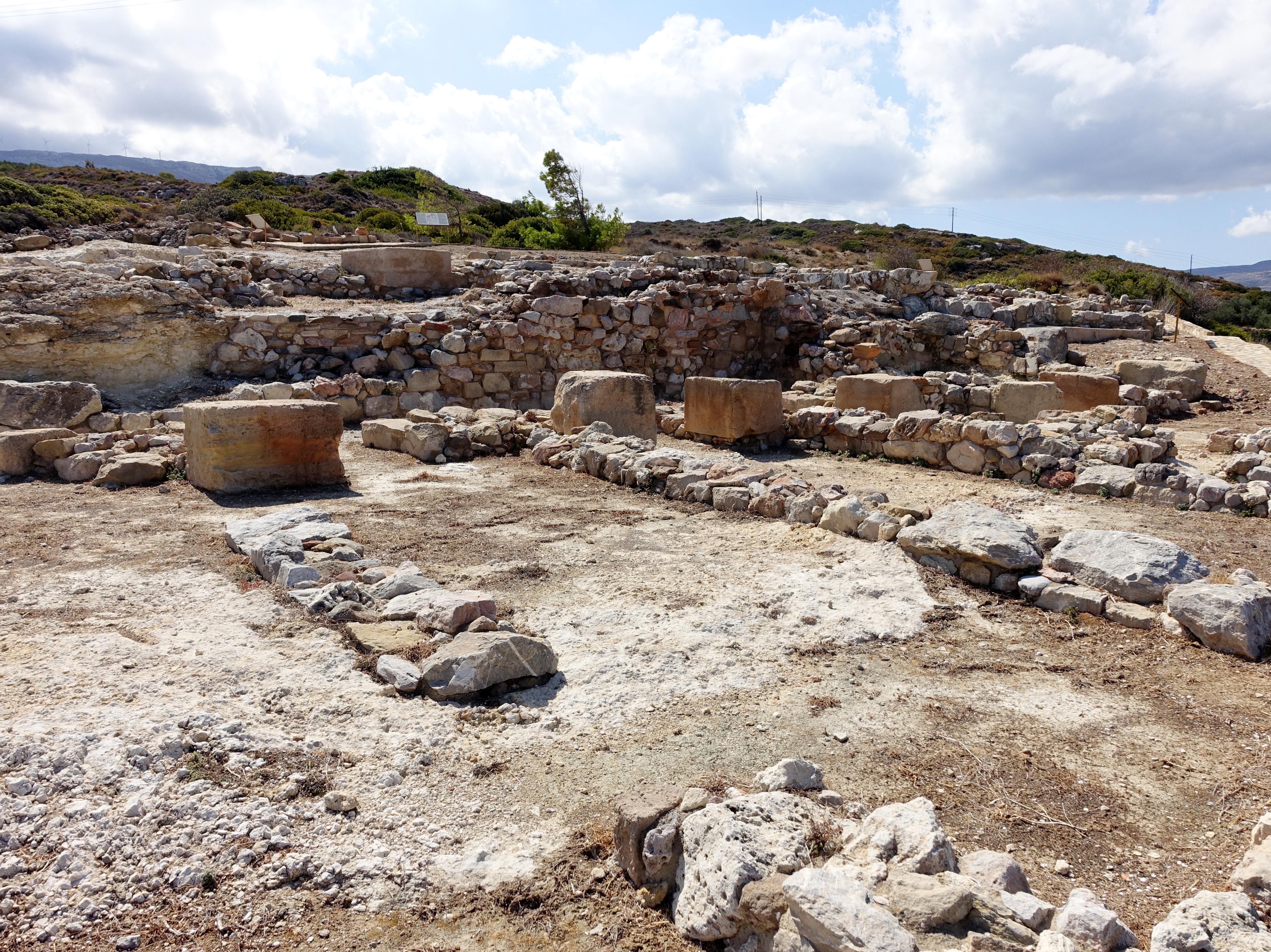 Minoische Ausgrabungsstätte von Petras (Πετράς), Gemeinde Sitia, Kreta, Griechenland